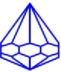 LogoCR1